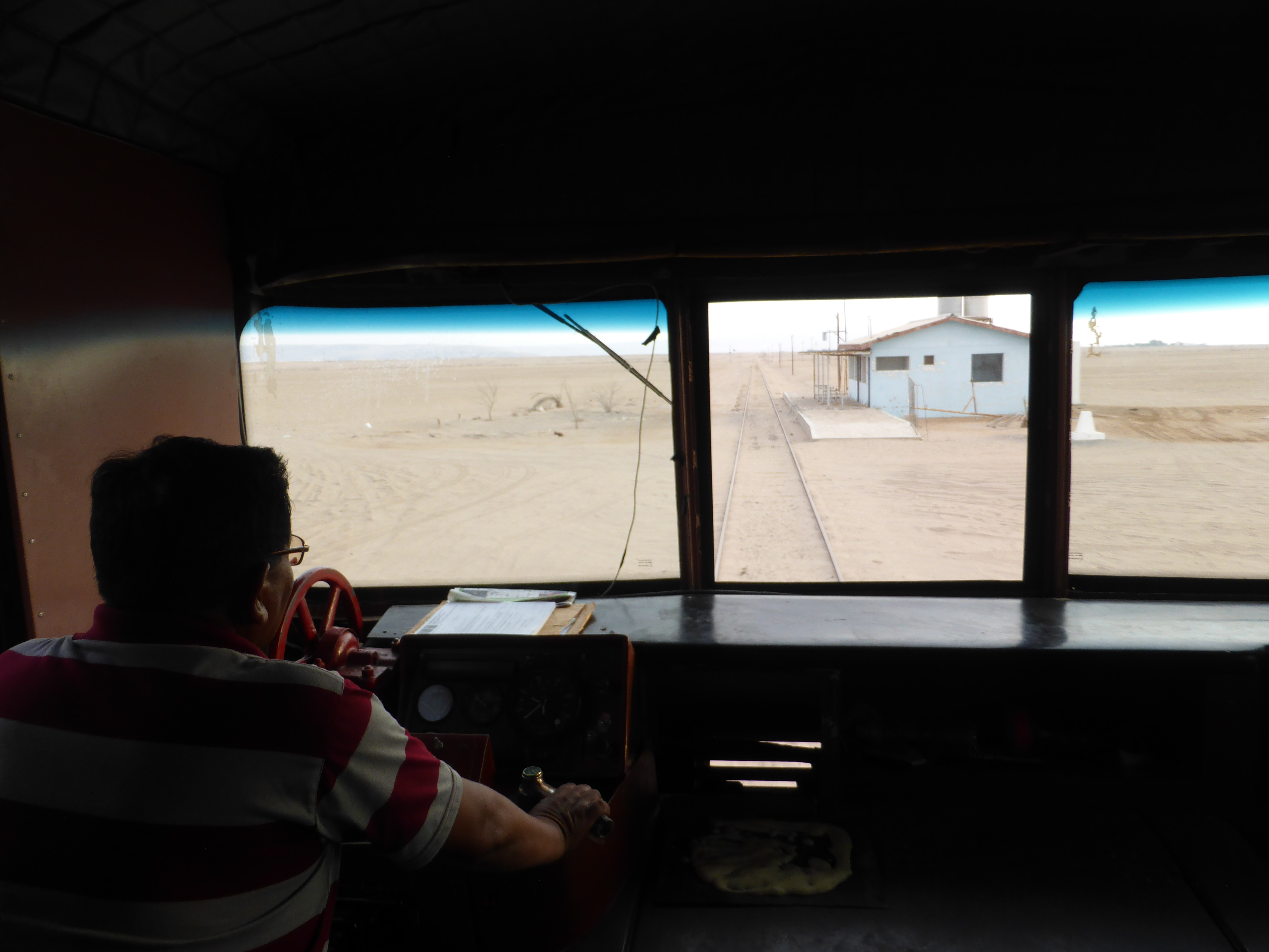 El motorista o maquinista ERNESTO CHOQUEHUANCA, en la cabina de conducción del autovagón 261 del "Ferrocarril Tacna-Arica". Esta vía ferroviaria internacional une Tacna (Perú) con Arica (Chile). Estación Escritos abandonada.